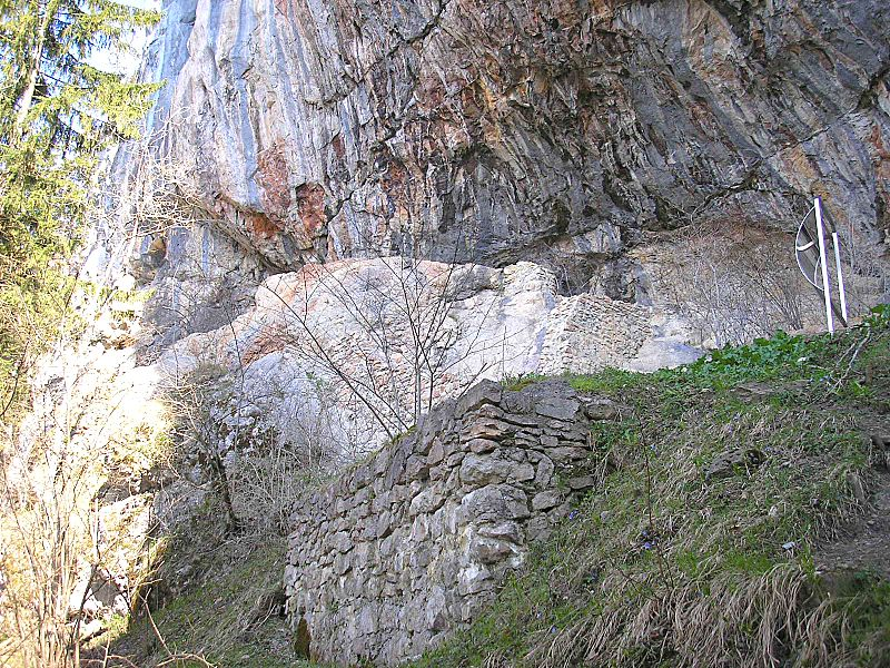 Höhlenburg (Schloss im) Loch über Unterpinswang (Tirol). Gesamtansicht vom Zugang.